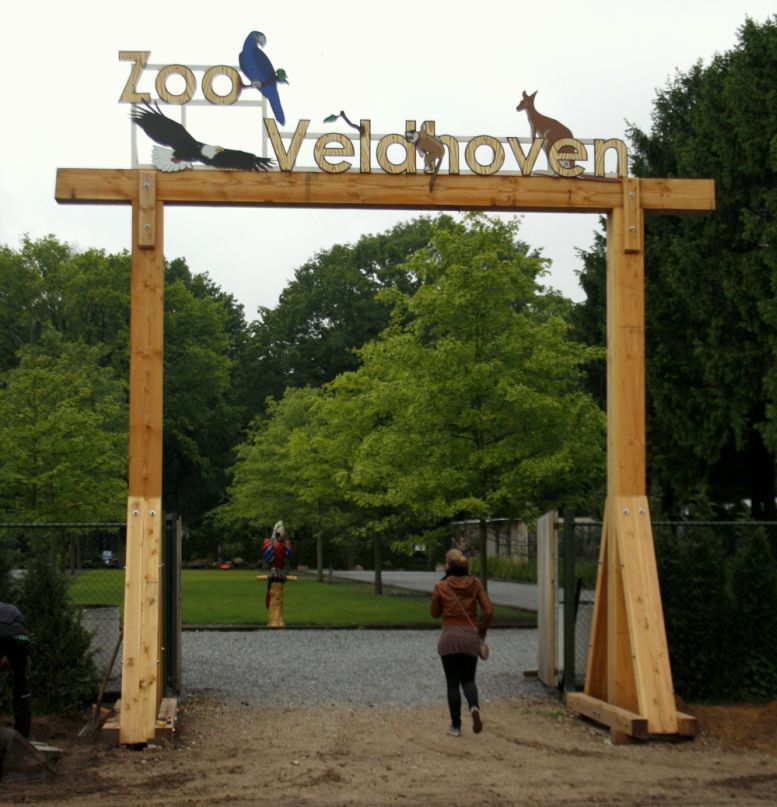 Ingang Zoo Veldhoven